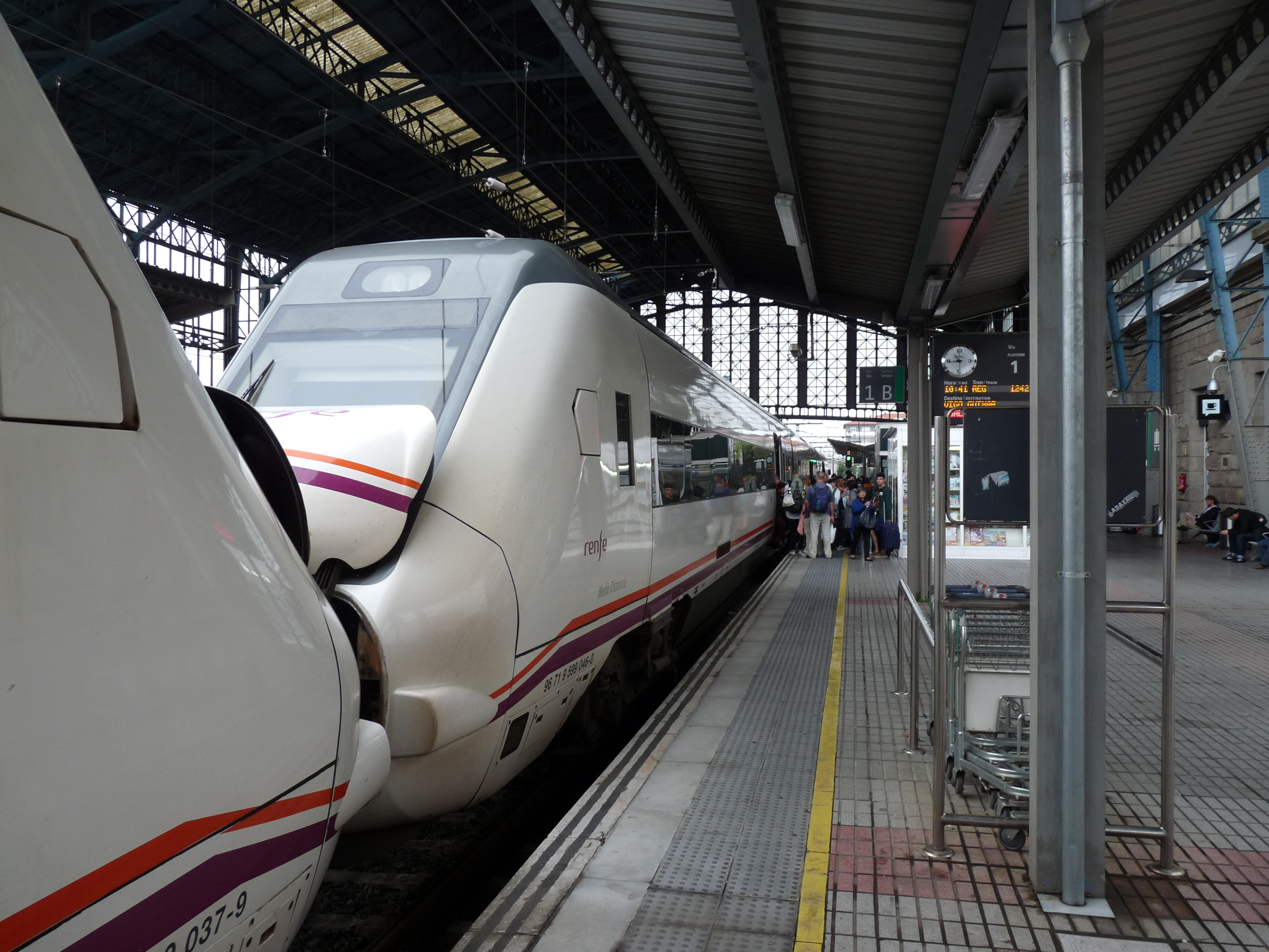 Aankomende trein in Santiago de Compostela